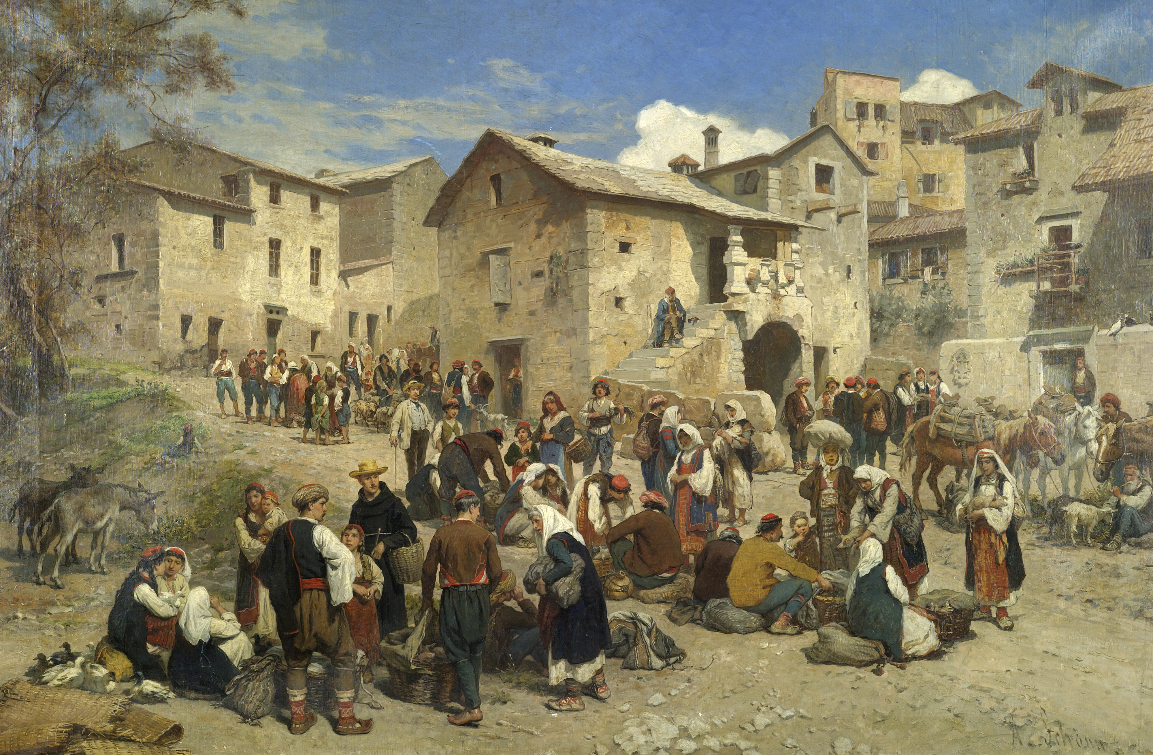 Markt in Sarajewo.label QS:Lde,"Markt in Sarajewo."